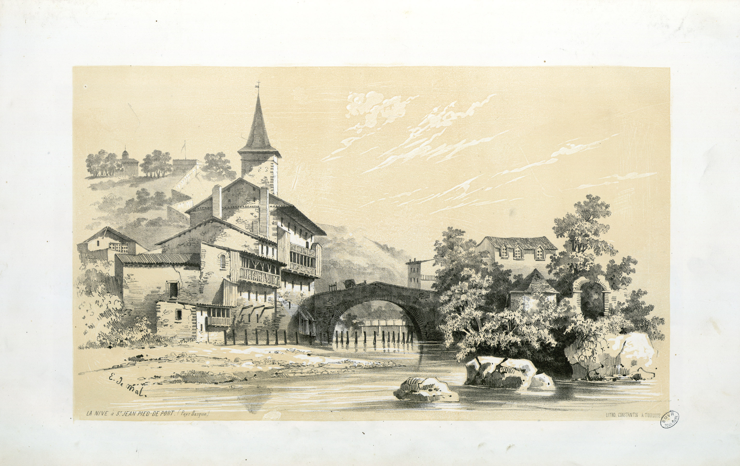 Fait partie d'un recueil de 15 planches lithographiées en camaïeu avec titre lithographié Ancely, René (1876 - 1966). Possesseur